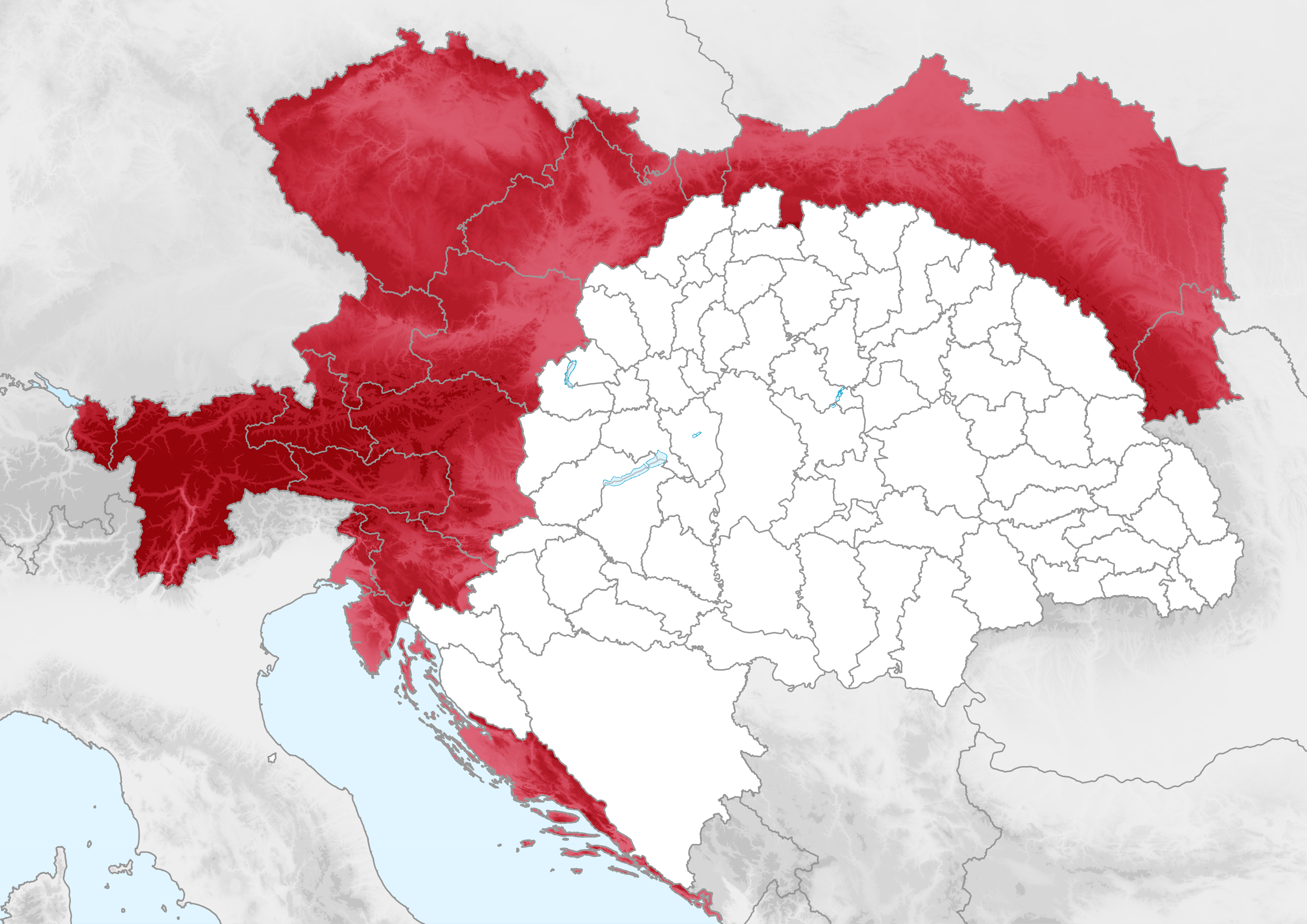 Carte de la partie autrichienne de l'Autriche-Hongrie en 1914